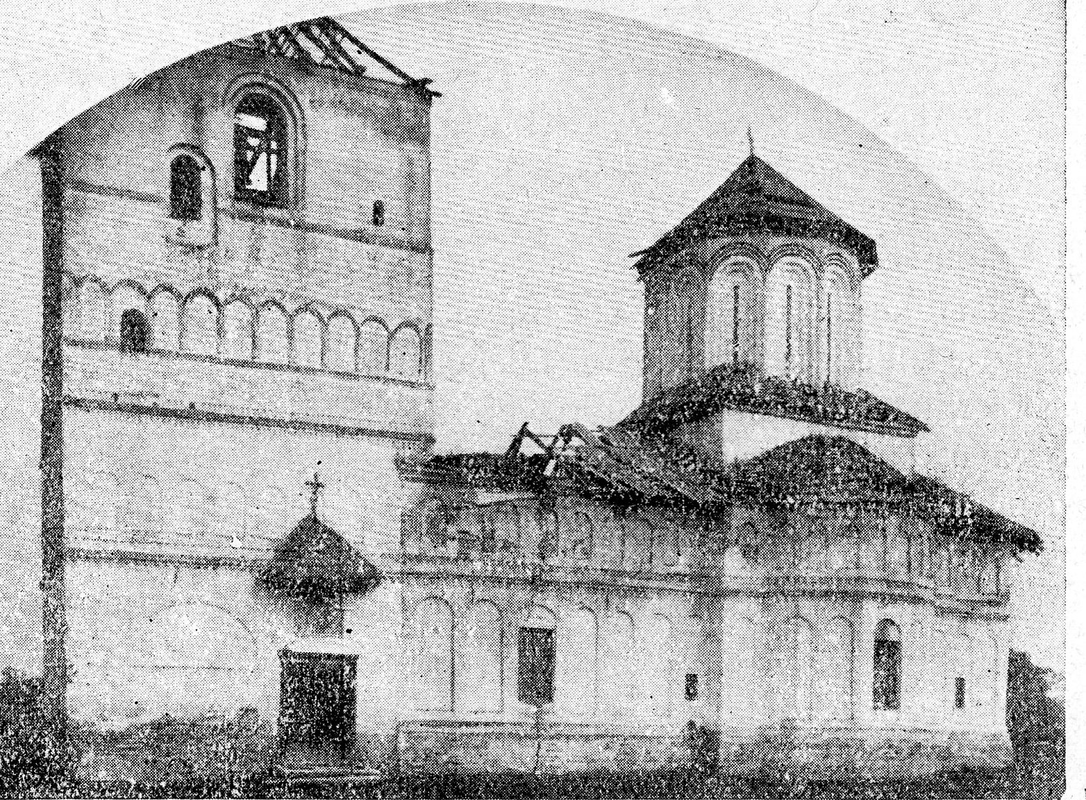 Biserica Mânăstirii Jitianu la începutul secolului al XX-lea.